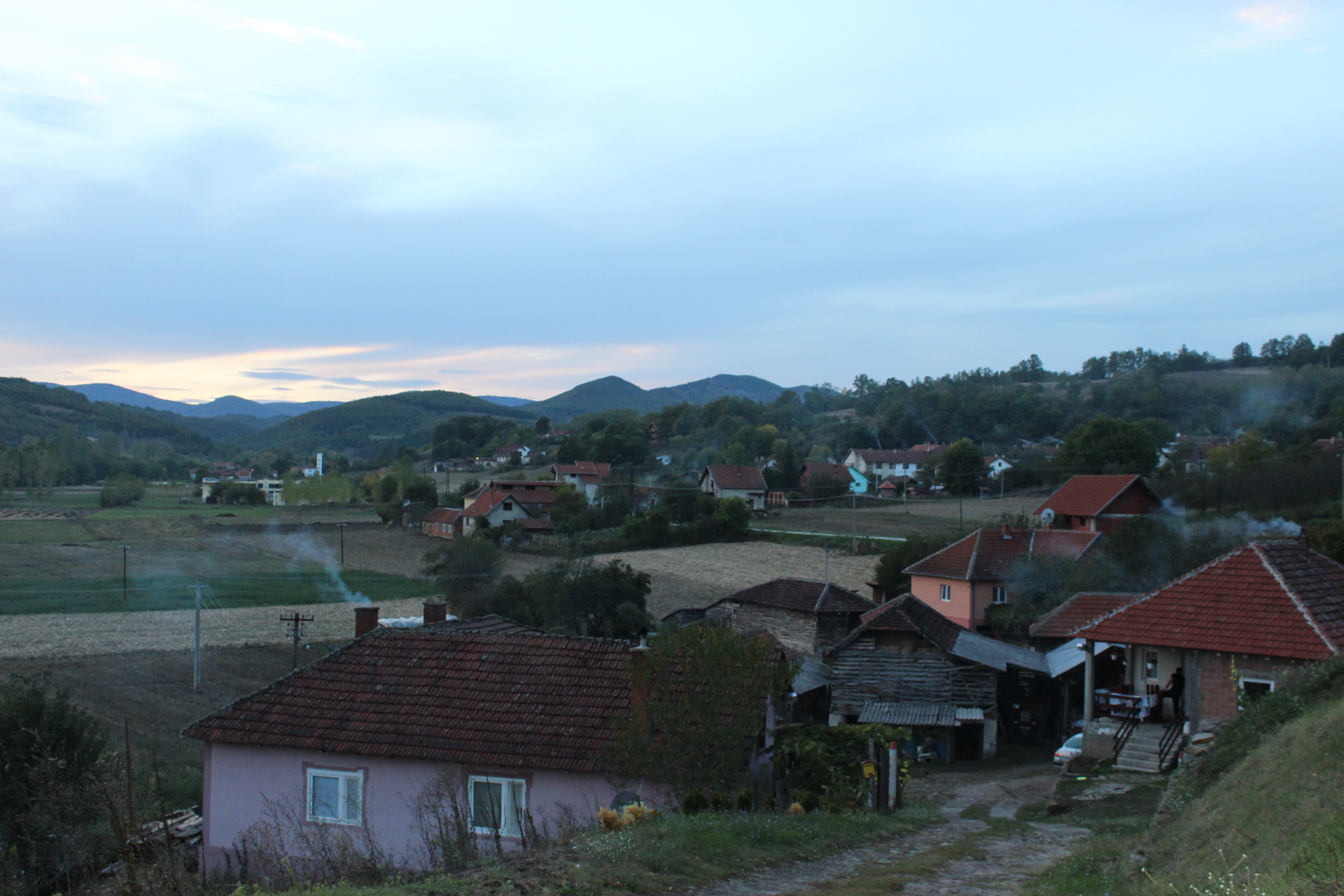 Srpski (latinica): Panorama Gazdara.